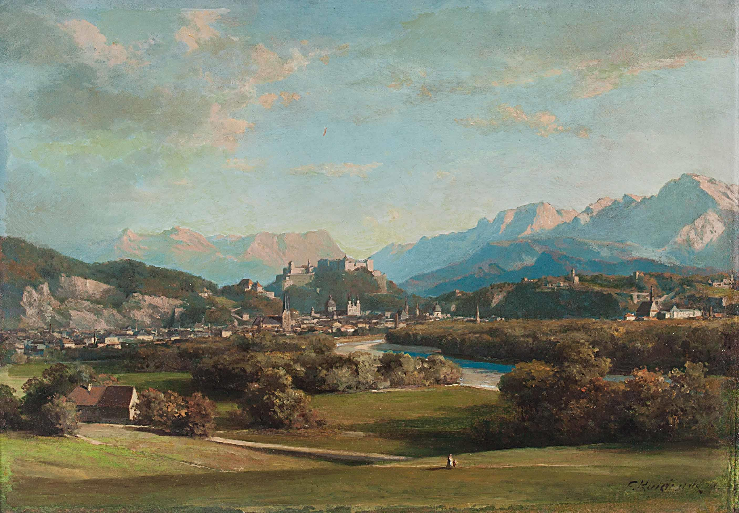 Panoramablick von Maria Plain auf Salzburg, Öl auf Presskarton, ca. 50x70cm